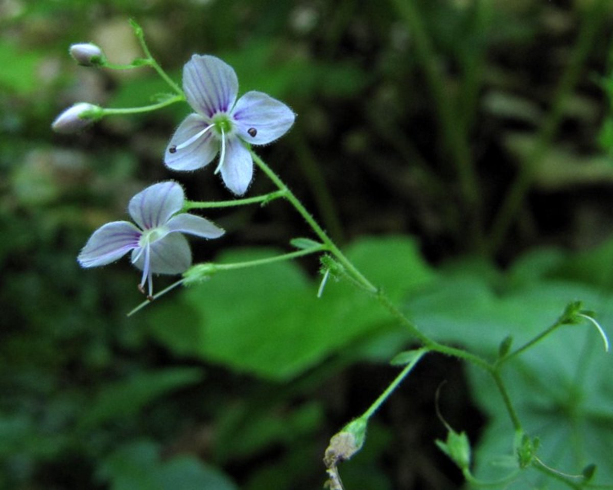 Koprivovolistni jetičnik v dolini Kamniške Bistrice.